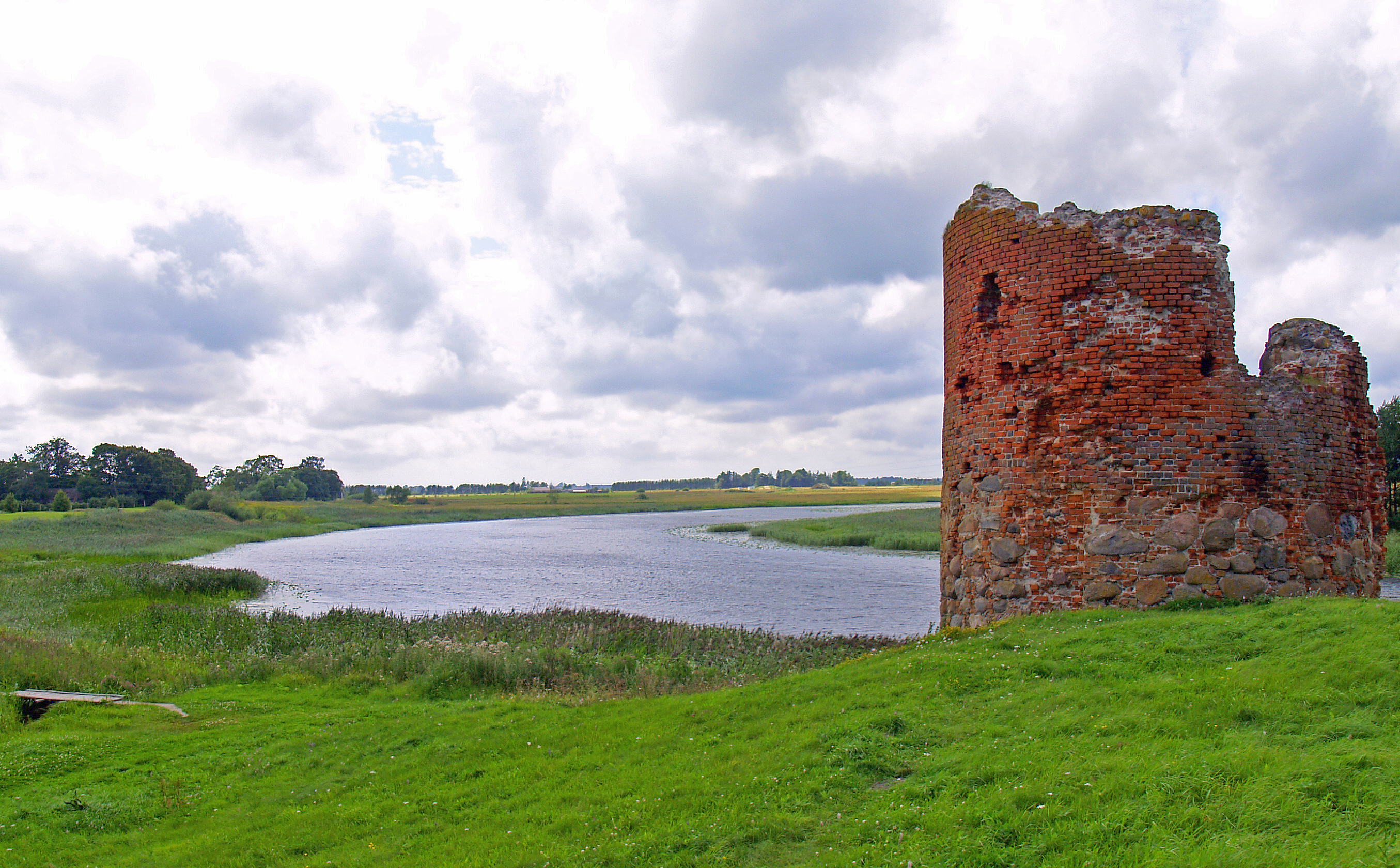 Piltenes pilsdrupas (Piltene castle ruins)